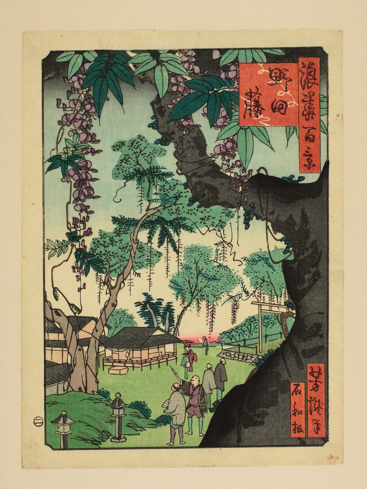 1800年代。里の家芳瀧/画。浪花百景 102枚のうちの1枚。大阪市立中央図書館蔵。